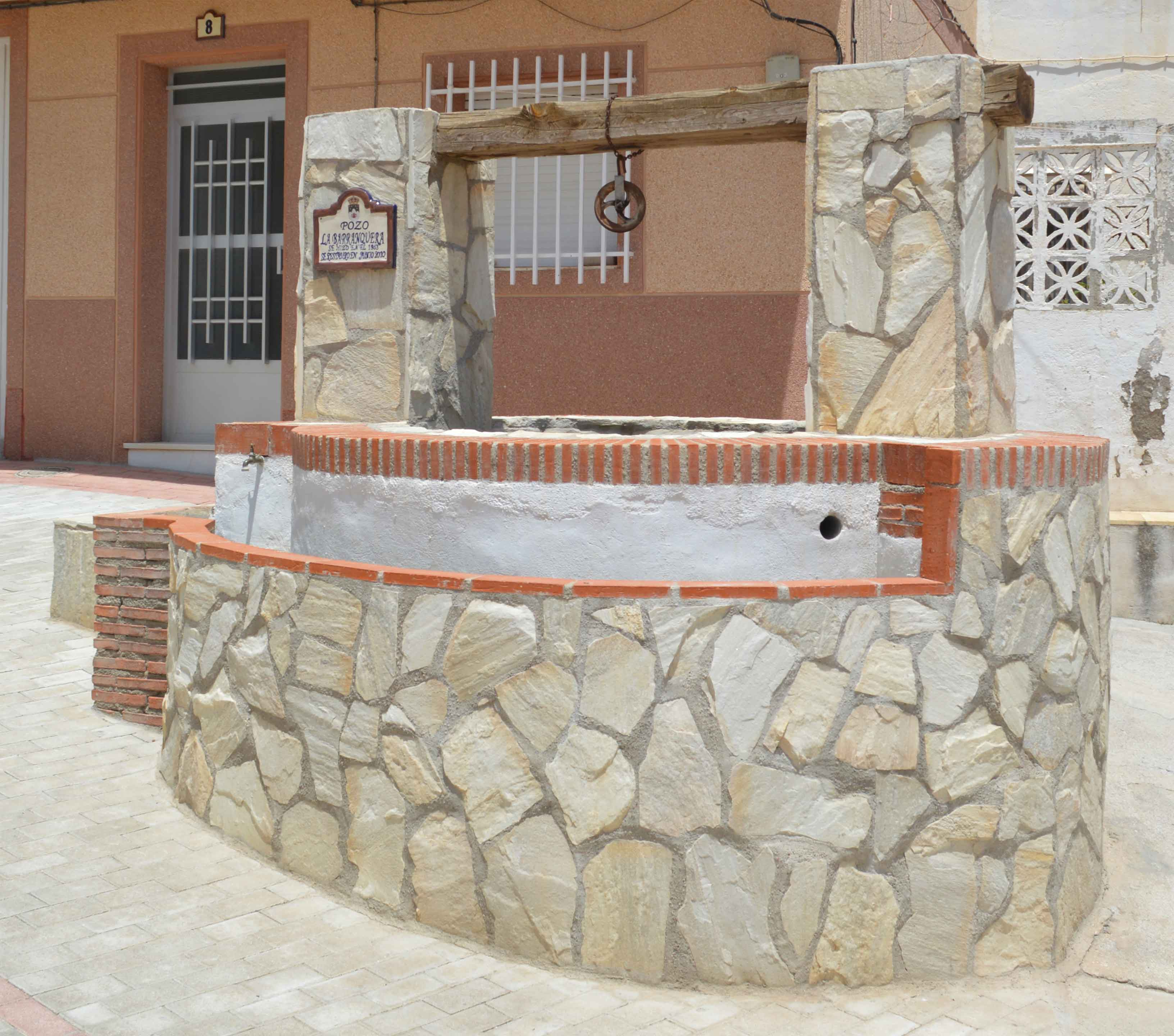 Restauracioh del pozo de la Barranquera 2010